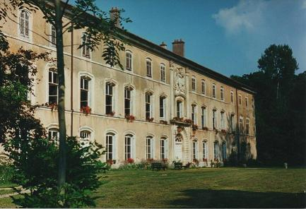 Château de Lenoncourtparc, tour, escalier, cheminée, élévation, toiture, décor intérieur